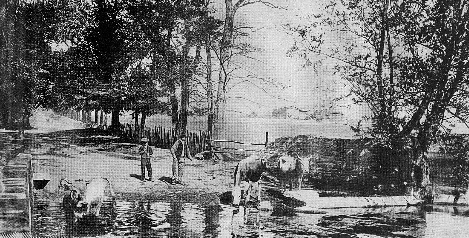 Dictionnaire illustré des communes du département du Rhône. Tome 1 / par MM. E. de Rolland et D. Clouzet.